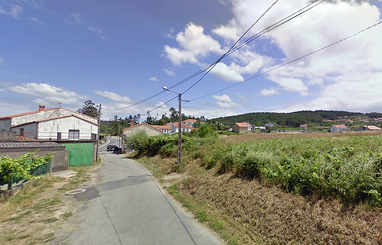 localidad capital de Lousame